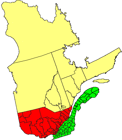 Karte mit den Regionen in der Provinz Québec